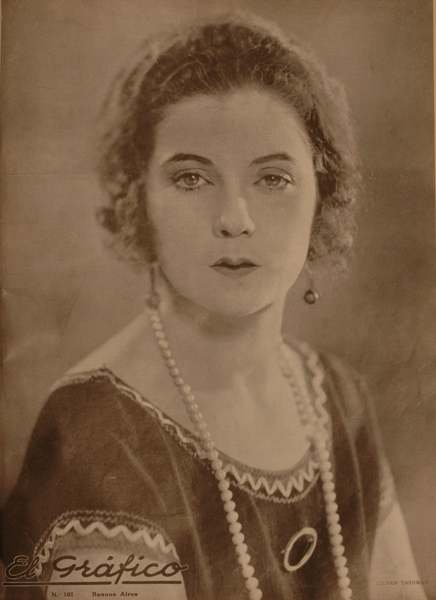 El Grafico del 28 de Mayo de 1921. Edicion 101